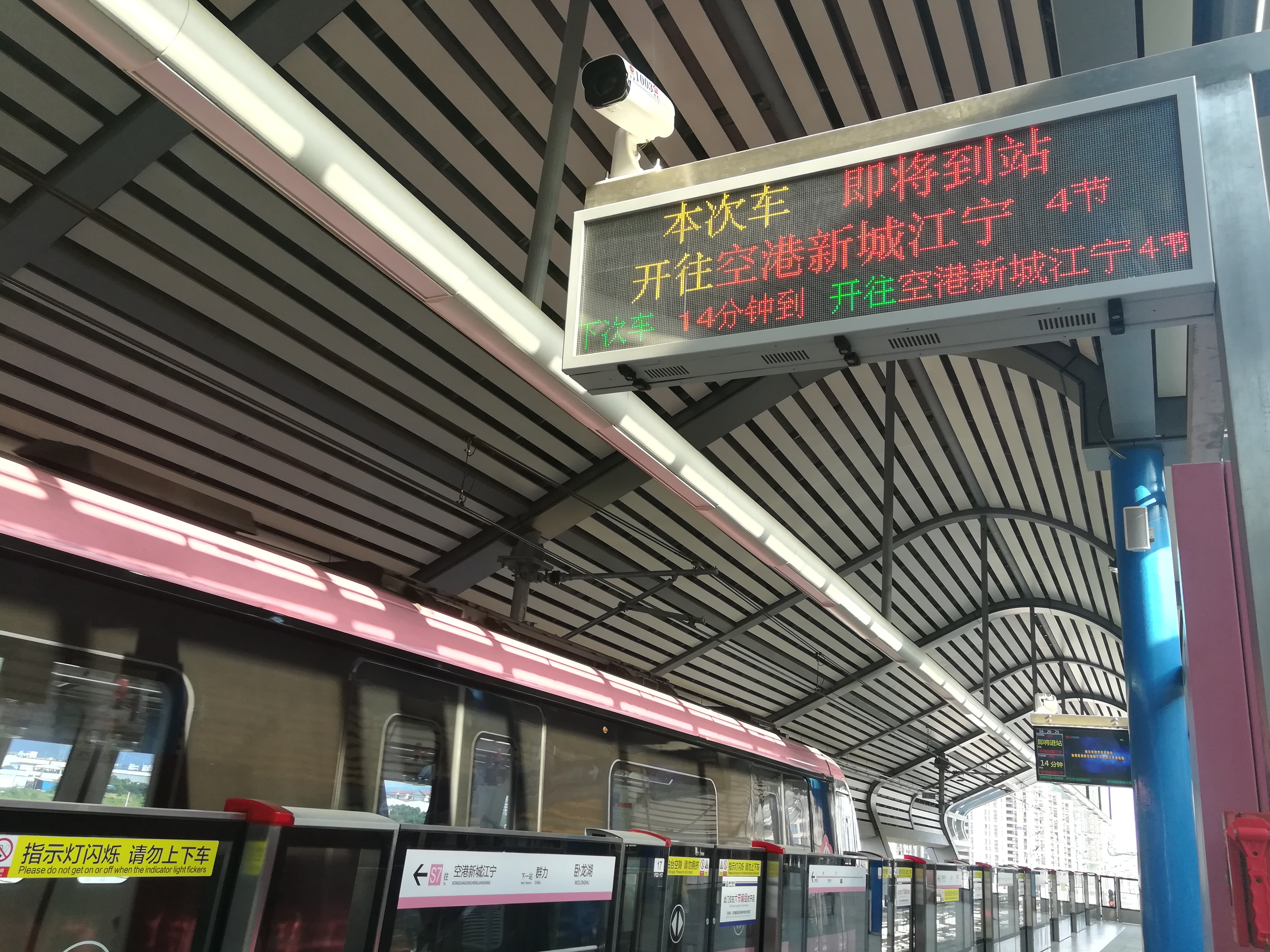 卧龙湖站，电子屏显示4节的列车到站。